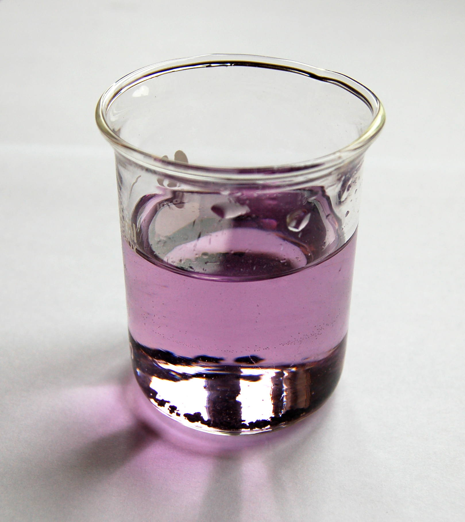 Hexaaquatitanium(III) solution